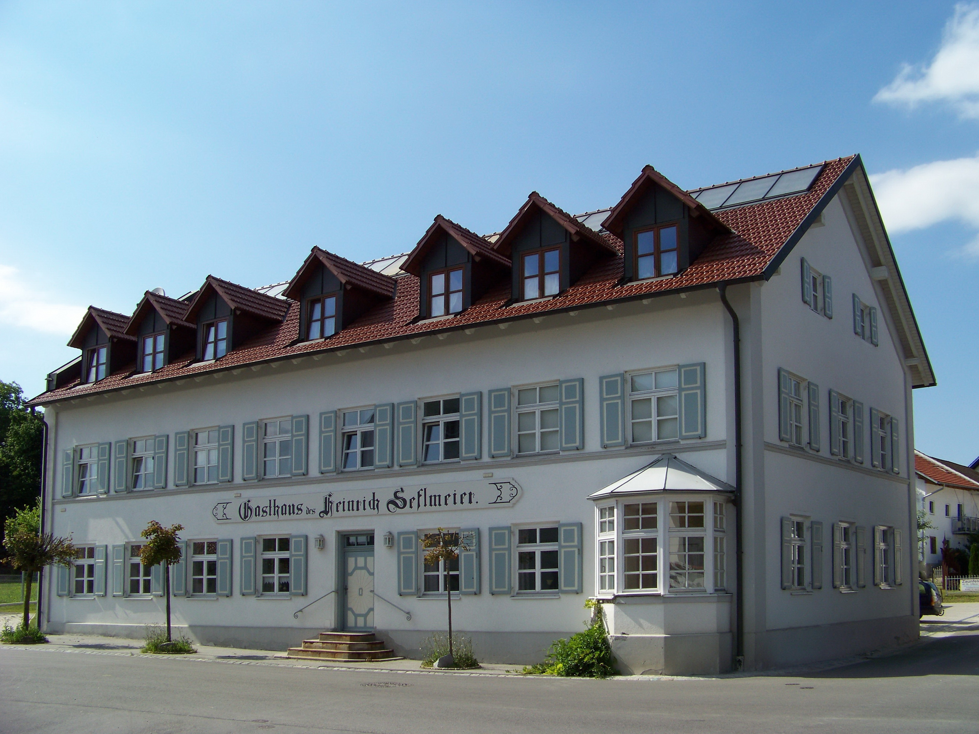 Moosthenning, Dingolfinger Straße 2. Gasthaus, zweigeschossiger Traufseitbau mit Satteldach, Erker und Putzgliederung, 1912.